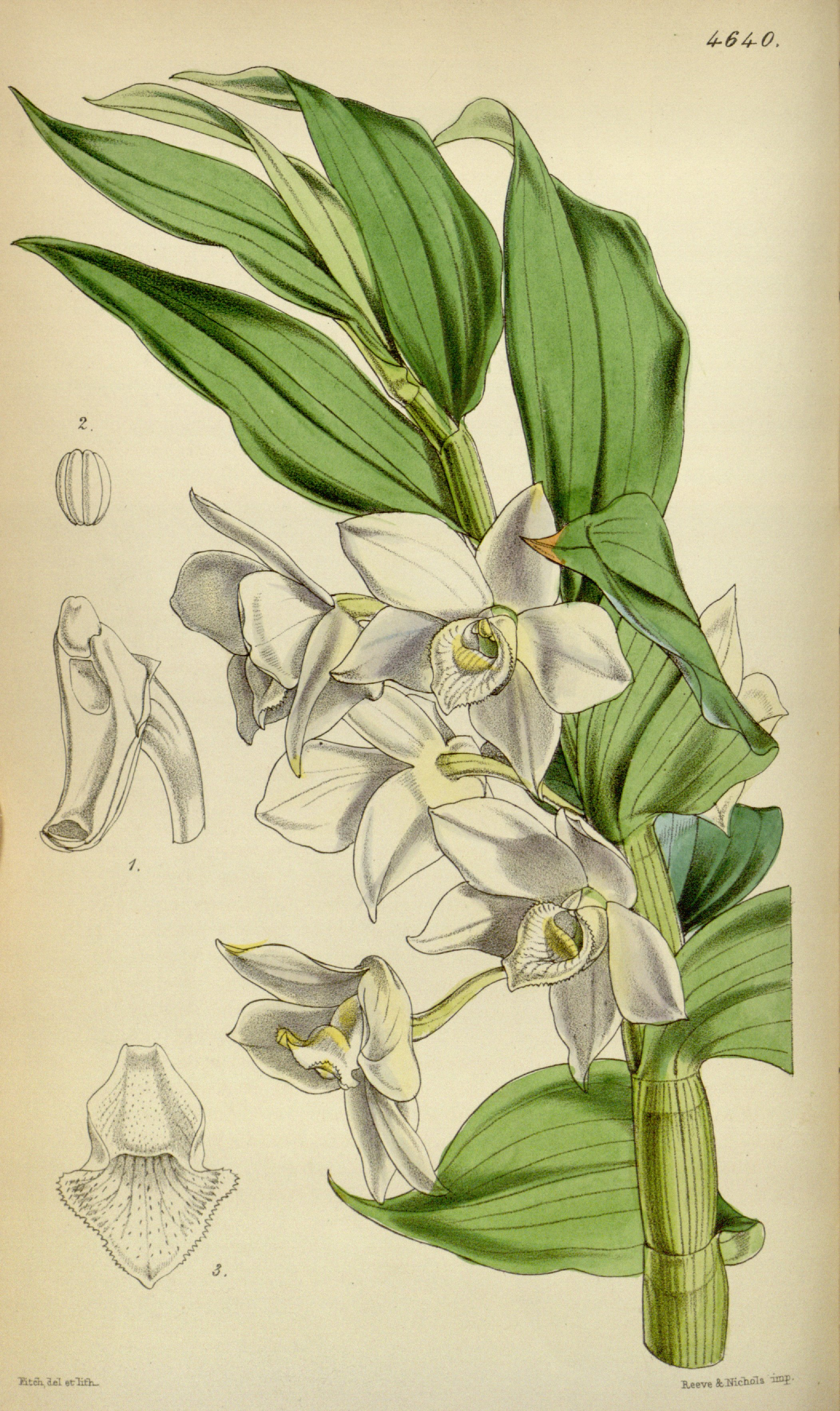 Illustration of Dendrobium aqueum